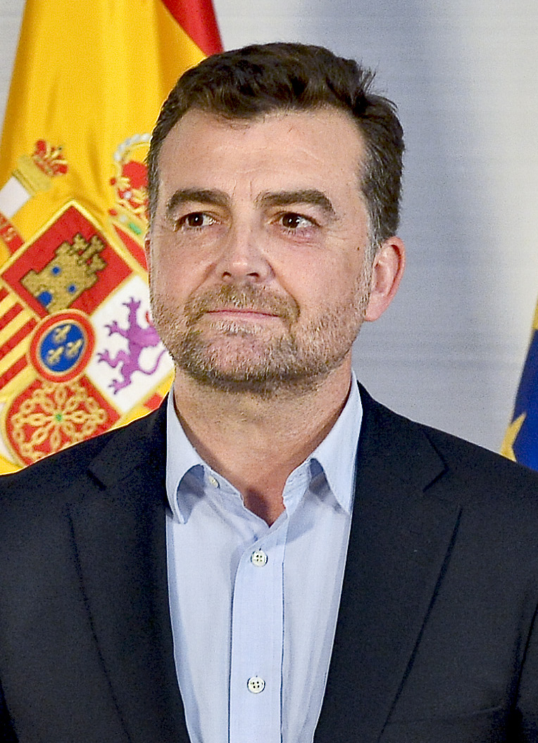 15.03.26-Reunión-1-con IU Andalucía